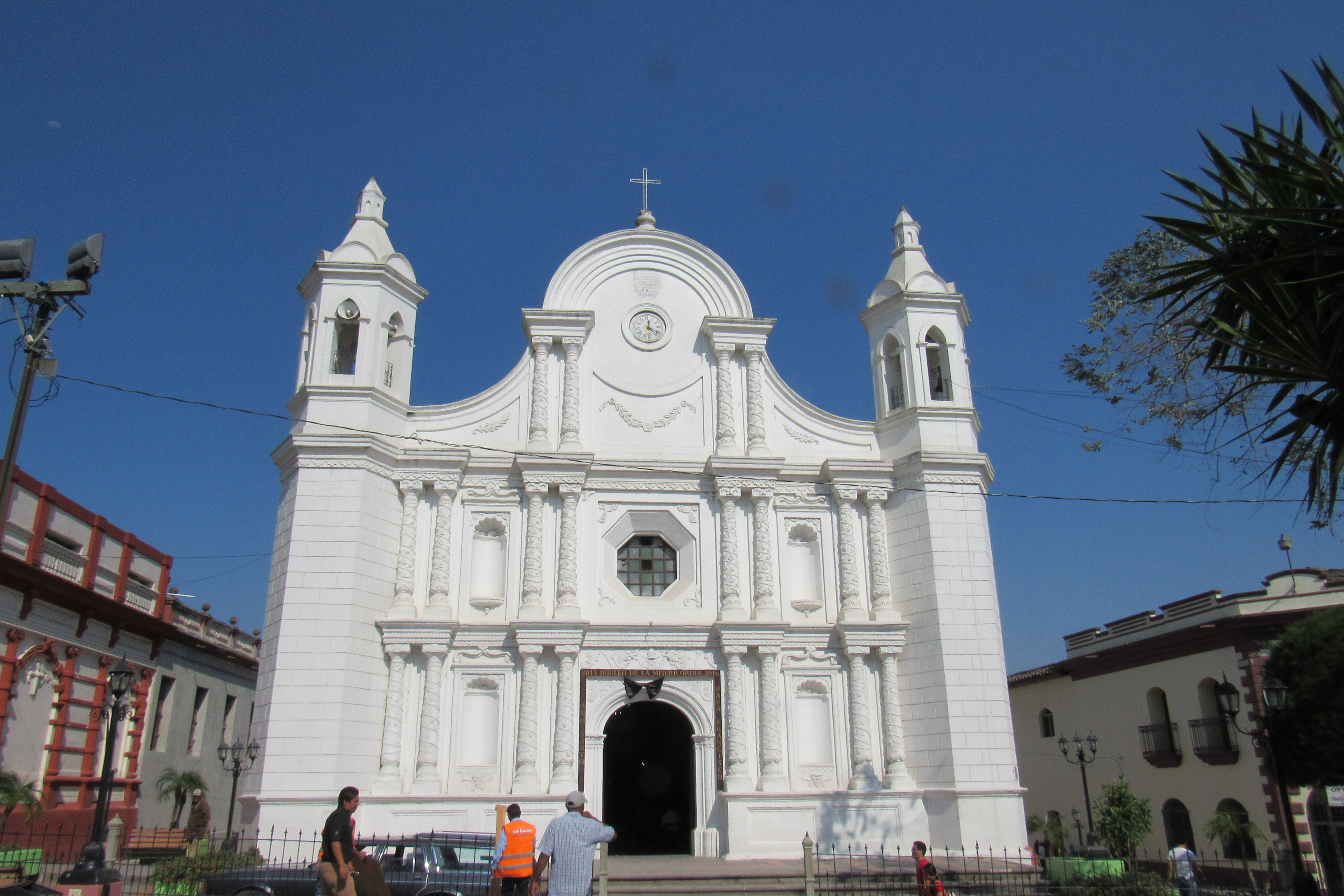 Una vista de la facha de la catedral de Santa Rosa